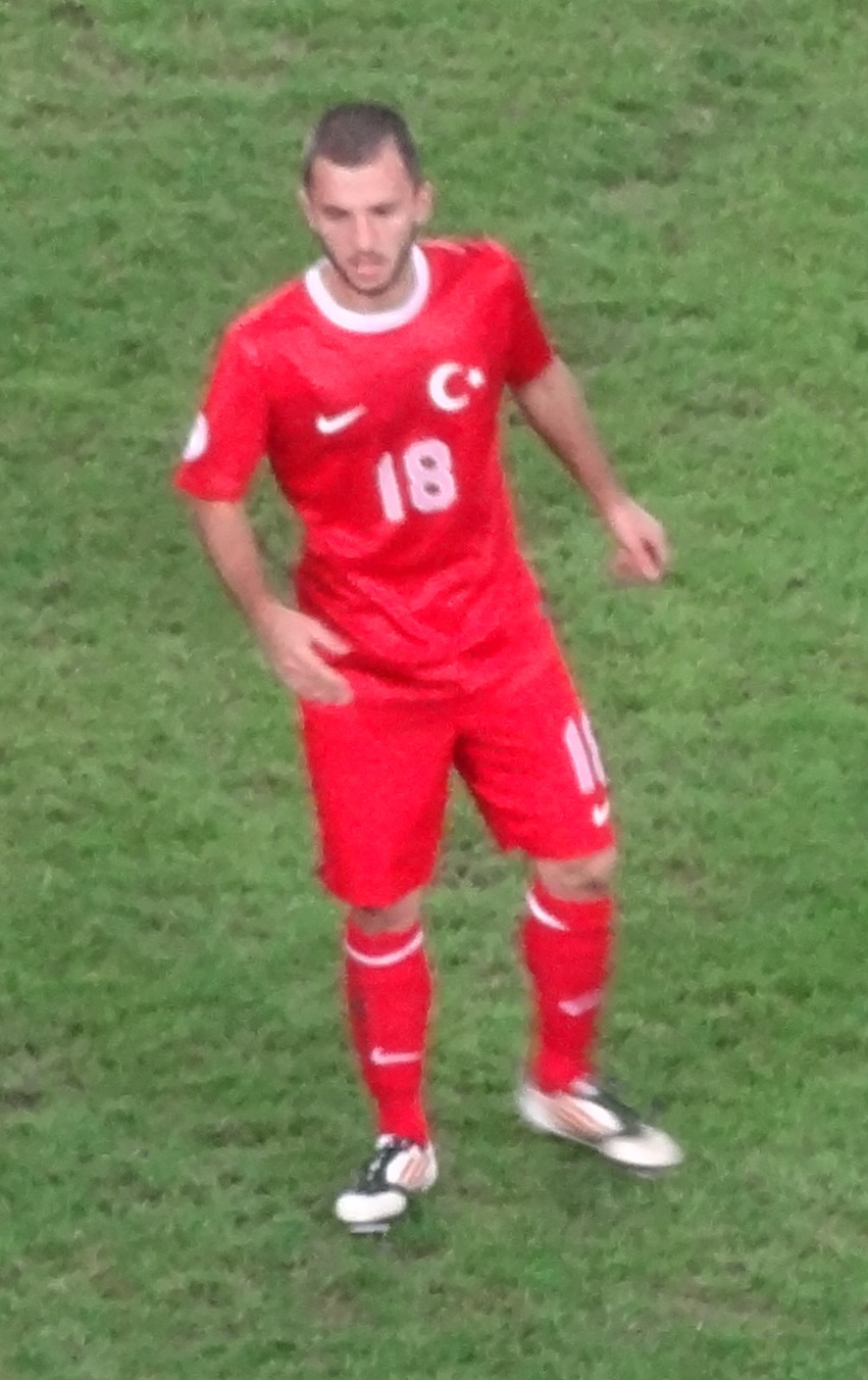 Emre Çolak Romanya karşısında